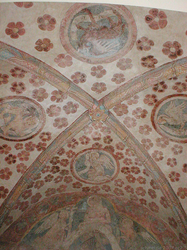 Historische Decken- und Wandgemälde im Turm der Pankratiuskirche in Heilbronn-Böckingen